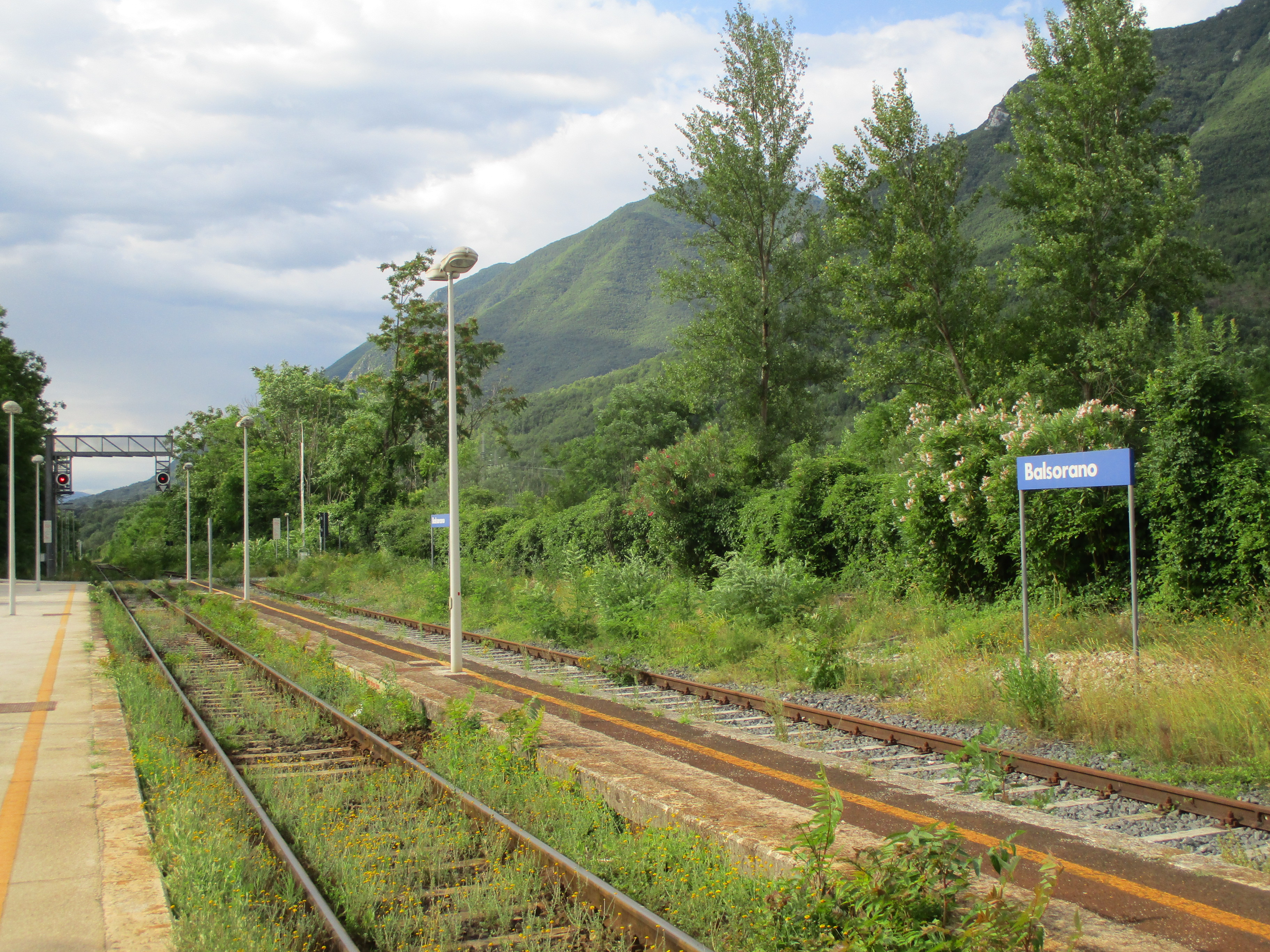 Ferrovia Avezzano-Roccasecca nei pressi di Balsorano